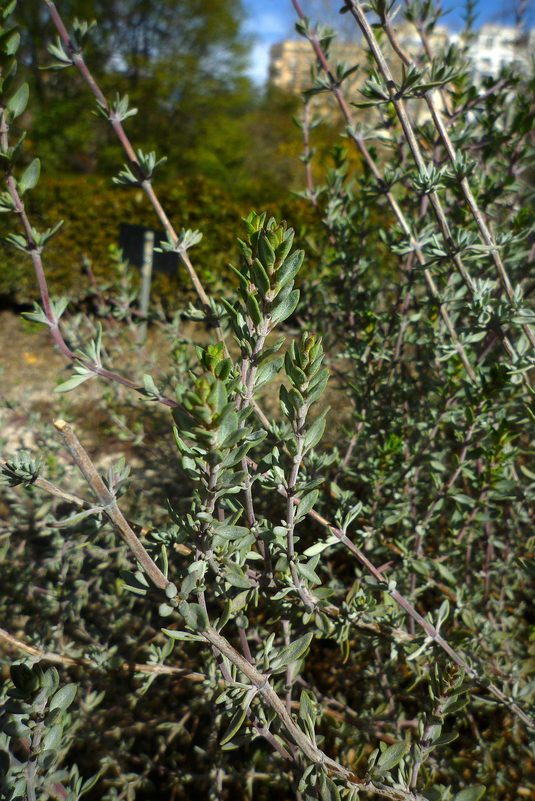 Thymus albicans en el Real Jardín Botánico de Madrid. Marzo 2018.